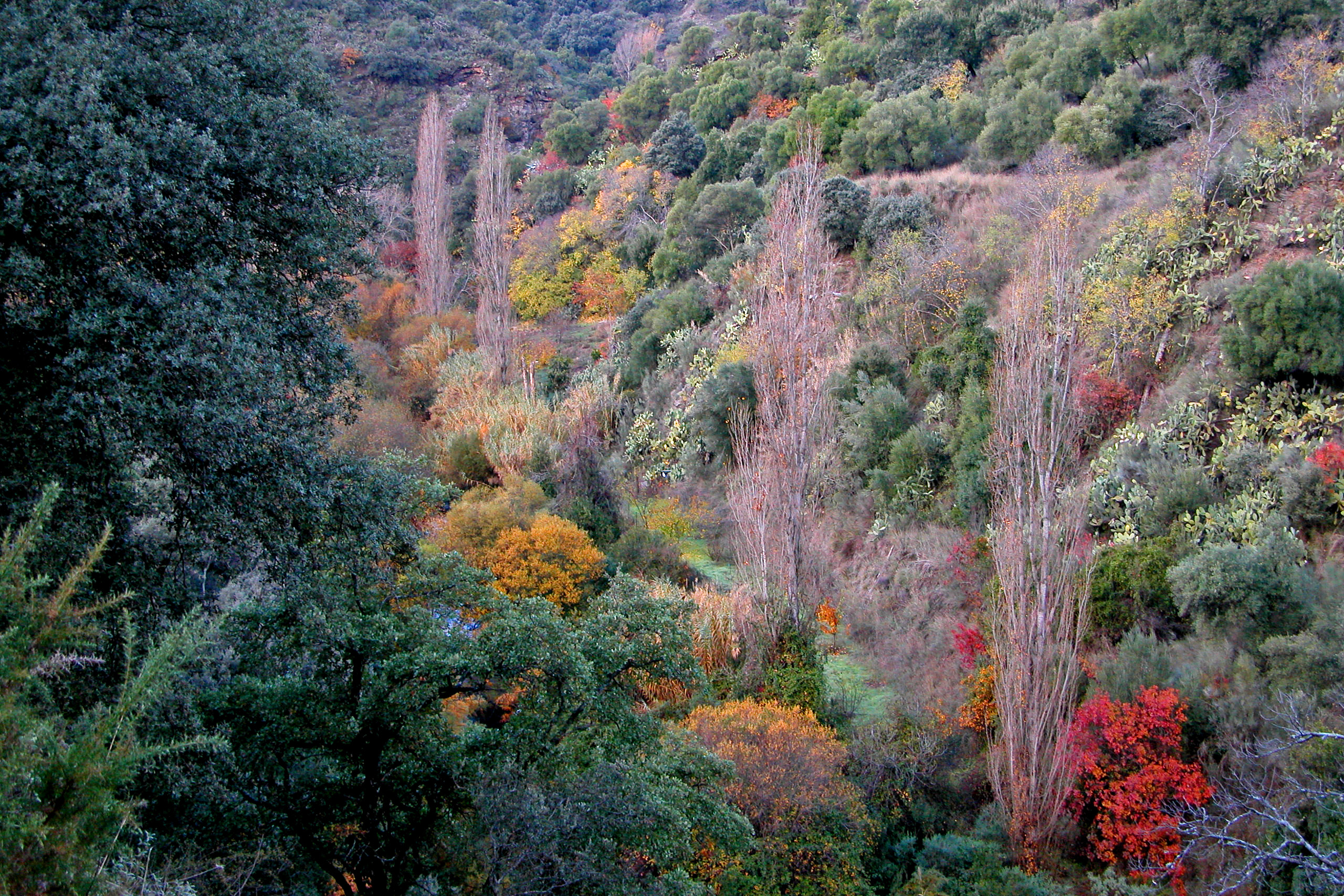 Valle del Genal This is a photography of a Site of Community Importance in Spain with the ID: ES6170016. Natura2000 entry, EEA entry